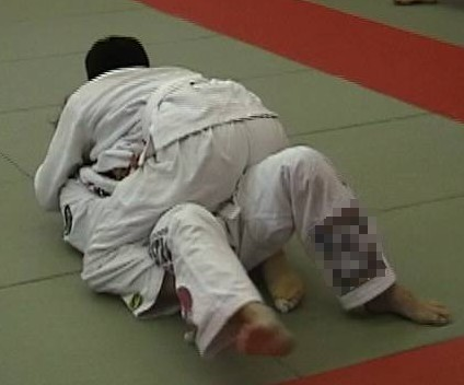 縦四方固・画像